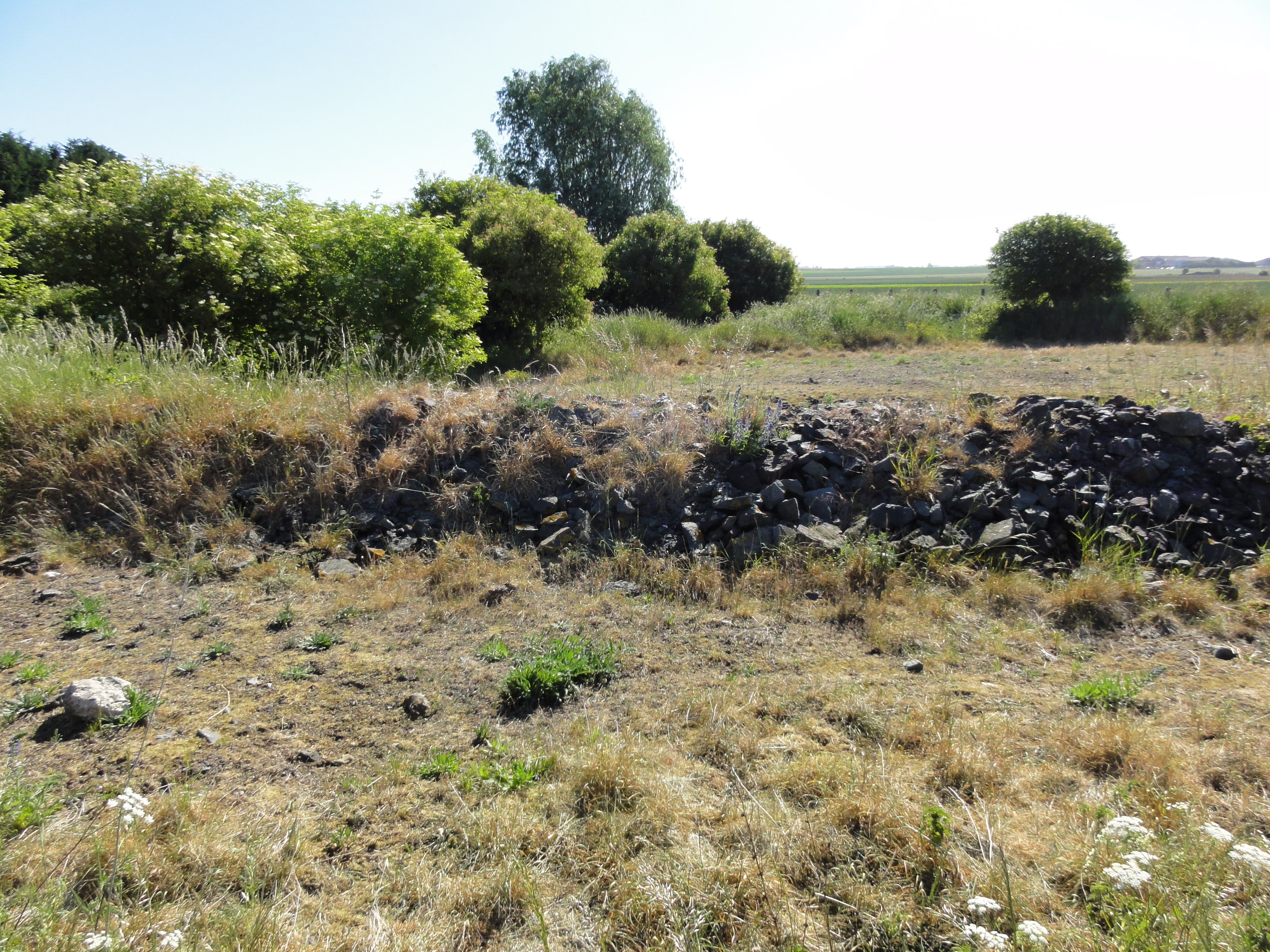 Terril n° 216 dit 8 de Liévin, Fosse n° 8 du Groupe de Liévin, Avion, Pas-de-Calais, Nord-Pas-de-Calais, France.